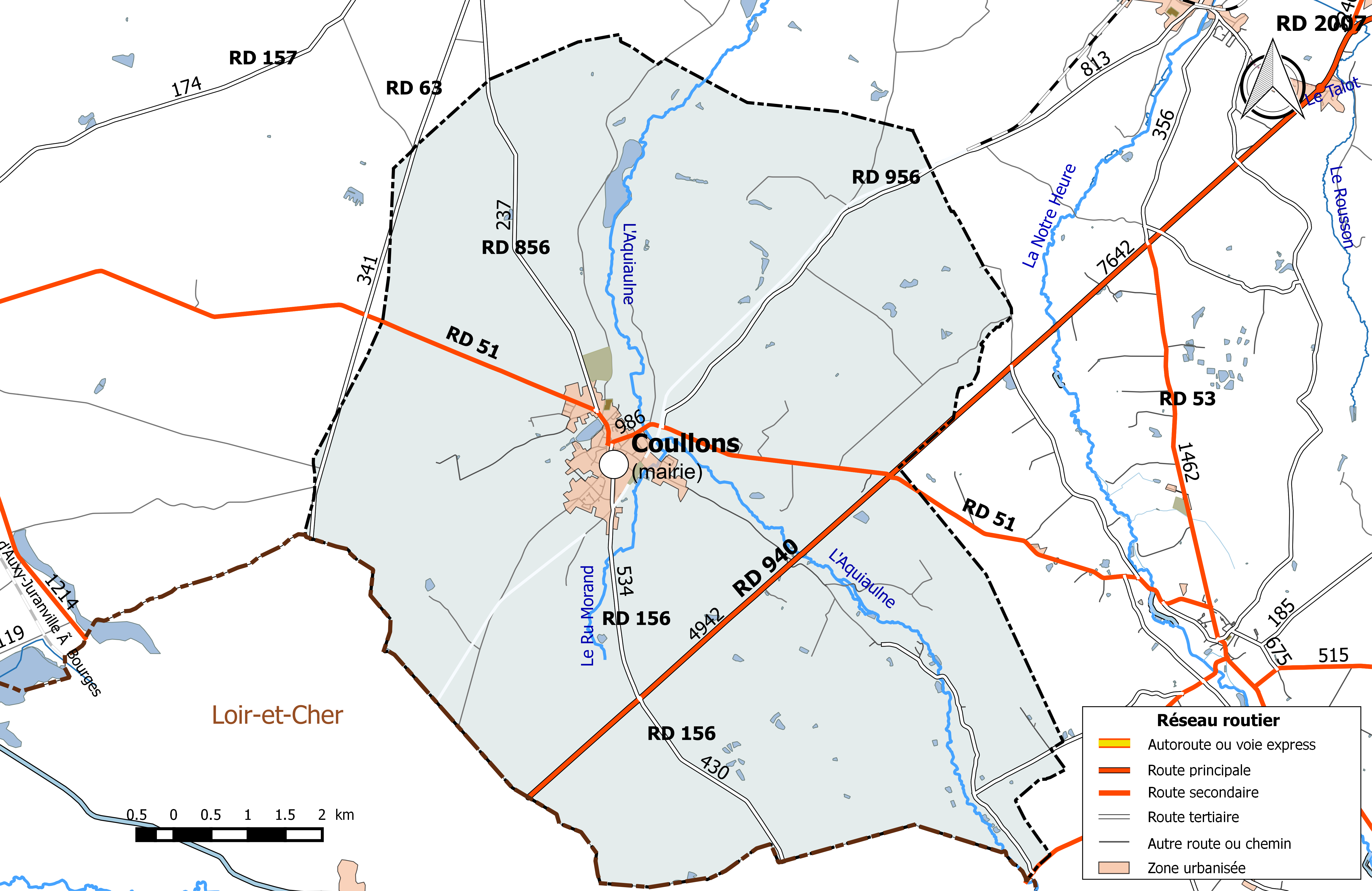 Carte du réseau routier de la commune de Coullons.